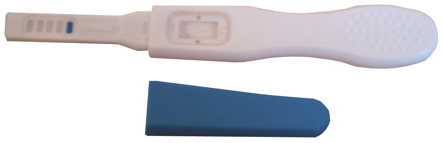 Ingredientes fundamentales de la Hallaca